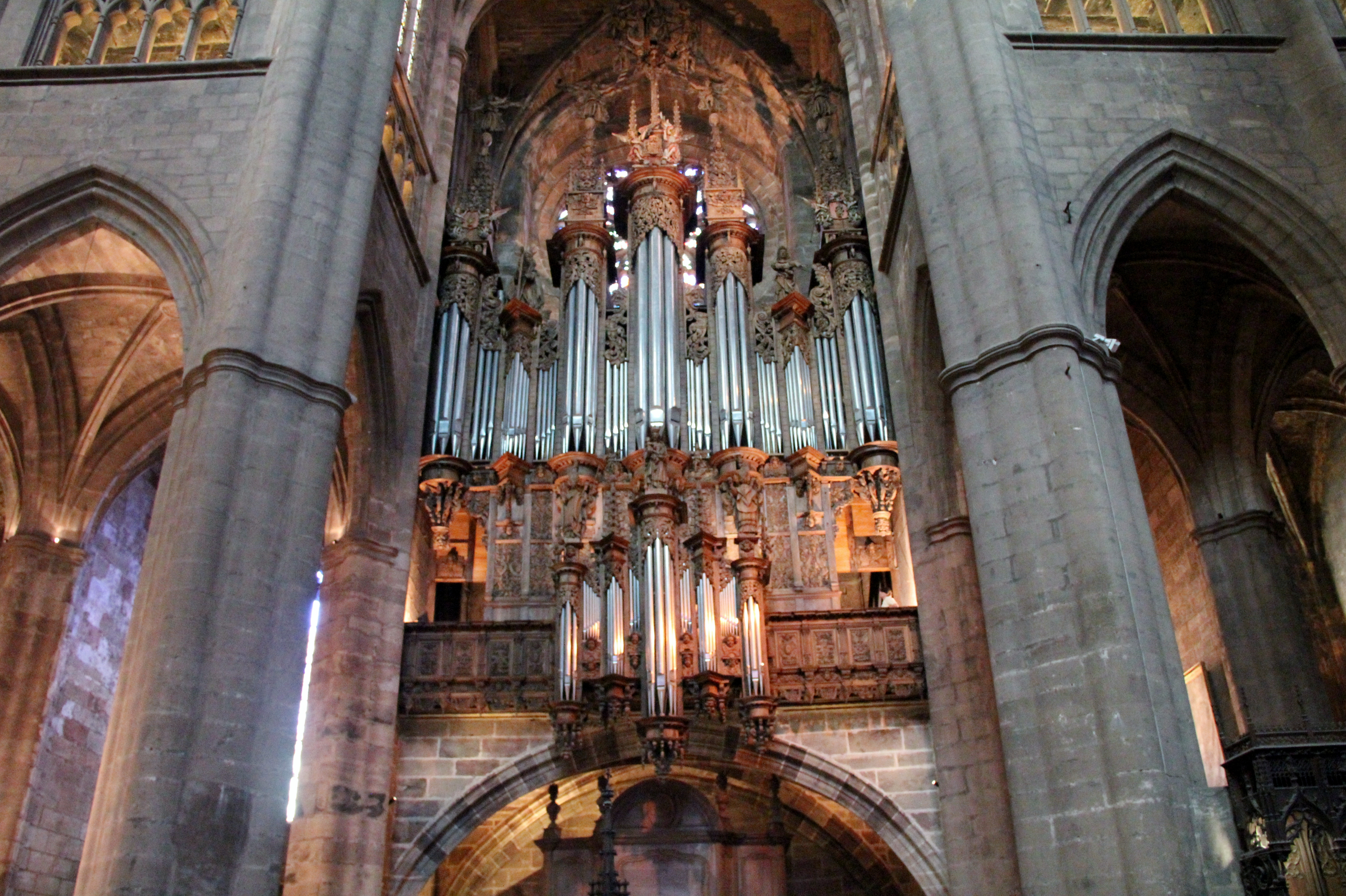 Grandes Orgues